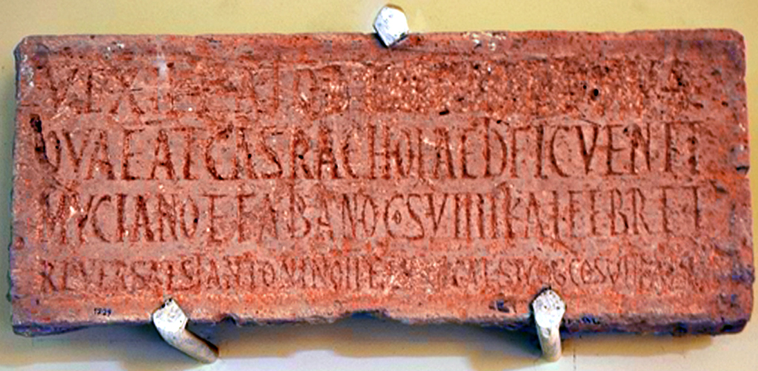 Das Kastell Gholaia, das durch antike Quellen auch als castra Chol(aia), [G]olas sowie in der Tabula Peutingeriana als Chosol überliefert ist, war ein römisches Militärlager, das für Sicherungs- und Überwachungsaufgaben am vorderen Limes Tripolitanus, einem tiefgestaffelten System von Kastellen und Militärposten, in der römischen Provinz Africa proconsularis zuständig war. Inschrift AE 1976, 698 = AE 1988, 1102, im Leptis Magna Museum, Libyen. Aufgrund ihrer Treue zu Kaiser Maximinus Thrax und dessen ihm loyal gebliebenen numidischen Statthalter Capelianus bei der Unterdrückung des Usurpators Gordian I. (238) ließ der nachfolgende Kaiser Gordian III. (238–244) die Legio III Augusta auflösen und den Namen der Legion ebenfalls eradieren. Die Inschrift wurde auf den Türsturz zur Cella des Tempels von Vanammon Augustus gemeißelt. Das Fundstück wurde 2006 im Archäologischen Museum von Leptis Magna photographiert. Vexillatio leg(ionis) [III Aug(ustae) P(iae) V(indicis) S(everianae)] quae at castra Chol(aiae) aedific(anda) venit Muciano et Fabiano co(n)s(ulibus) VIIII kal(endas) Febr(uarias) et reversa est Antonino II et Geta Caes(are) Augg(ustis) co(n)s(ulibus) VII kal(endas) Ian(uarias)